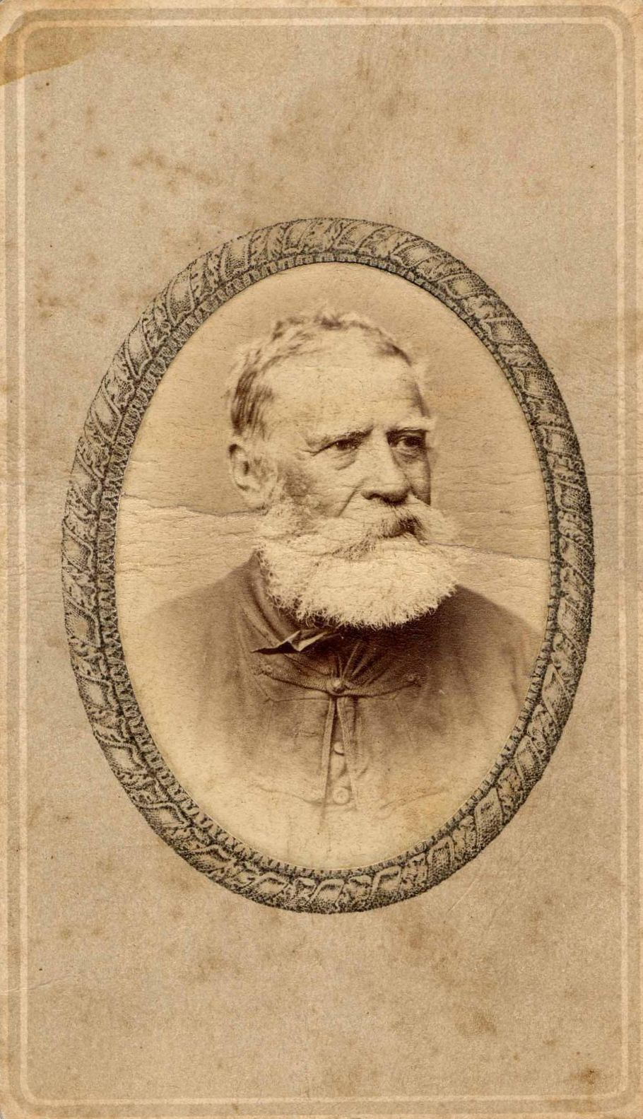 Telepi György (1797-1885) magyar színész, festőművész, díszlettervező, színházi technikus, drámaíró és fordító kb. 75 éves korában